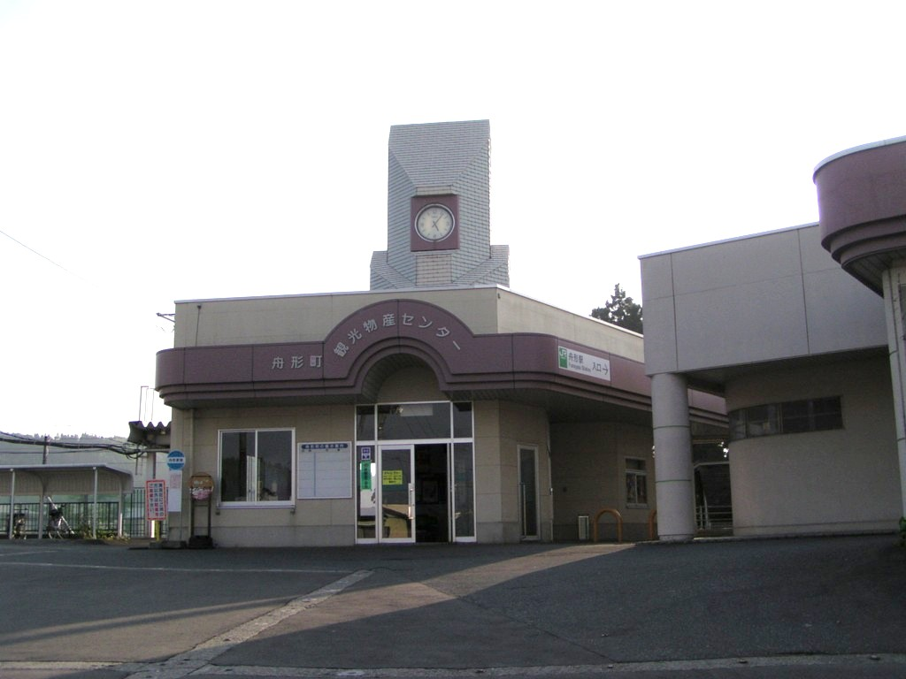 Funagata Station, Funagata, Yamagata, Japan